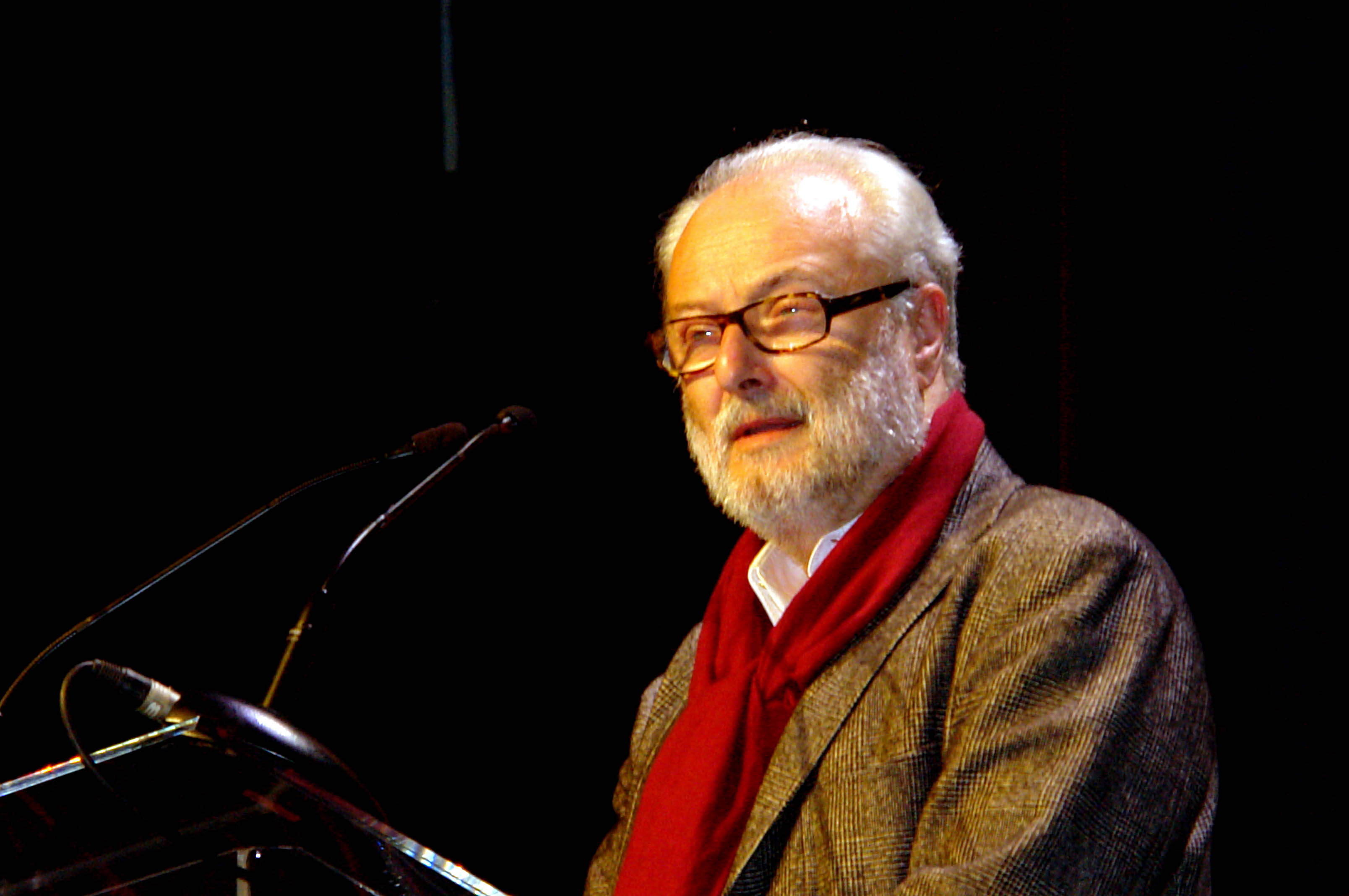 GERARD CORBIAU REMISE DES PRIX FIFF 2012